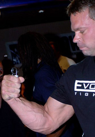 Джон Брзенк, 26-кратный чемпион мира по армрестлингу, удерживает эспандер. Captains of Crush №1.5